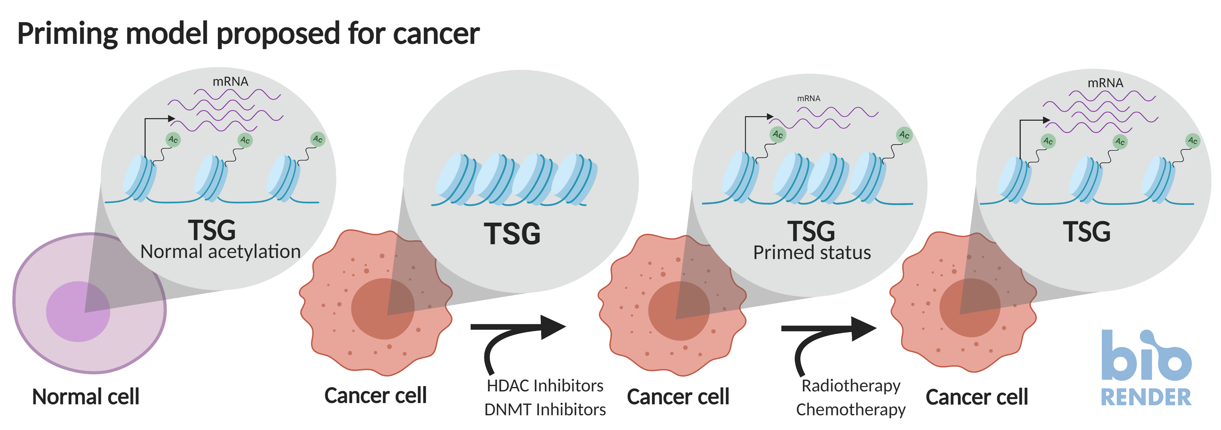 Sensitización de una célula cancerígena con priming epigenético.